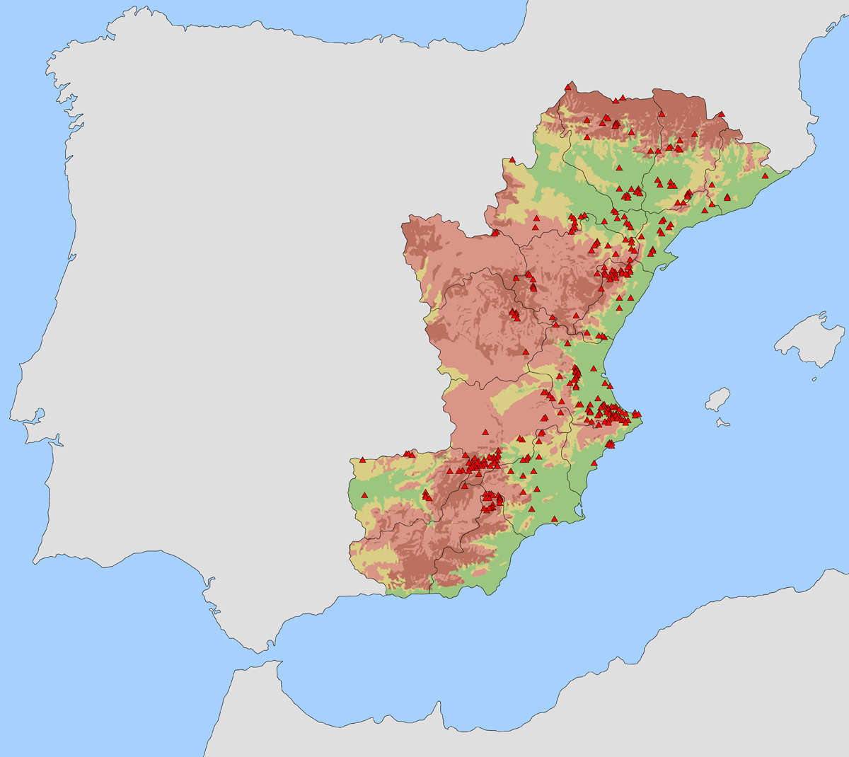 Localización de los principales yacimientos y ámbito geográfico del Arte rupestre del Arco mediterráneo de la Península ibérica indicándose los límites de las provincias en los que se encuentran los abrigos.